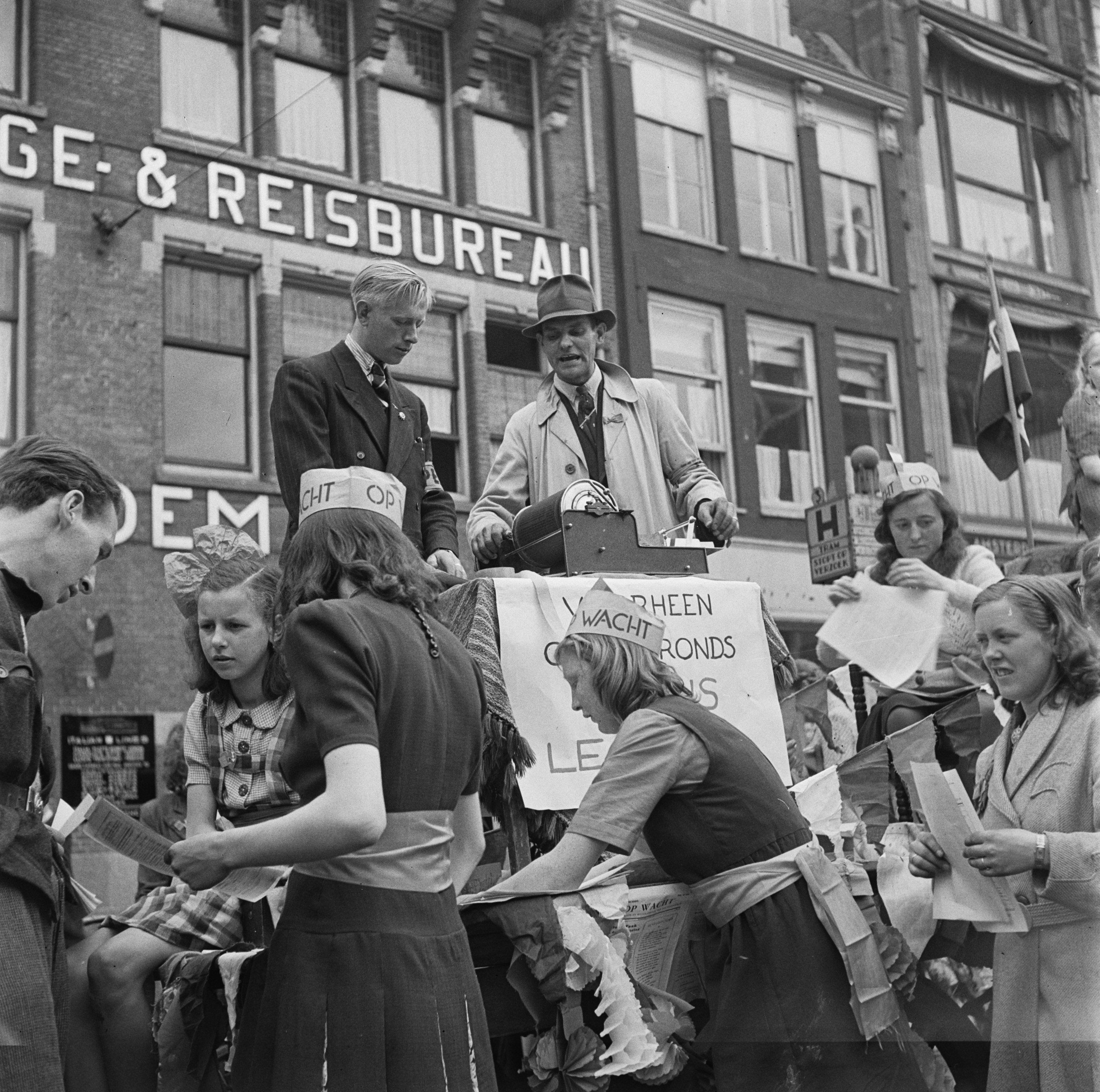 Collectie / Archief : Fotocollectie Anefo Reportage / Serie : Illigaliteit: Pers Beschrijving : Hoe de ondergrondse pers werkte; op een demonstratiewagen te Den Haag wordt het blad "Op Wacht" gestencild. Datum : mei 1945 Locatie : Den Haag Trefwoorden : illegale pers, illegaliteit, tweede wereldoorlog Fotograaf : Fotograaf Onbekend / Anefo Auteursrechthebbende : Nationaal Archief Materiaalsoort : Negatief (zwart/wit) Nummer archiefinventaris : bekijk toegang 2.24.01.03 Bestanddeelnummer : 900-2866